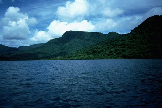 Vanikoro